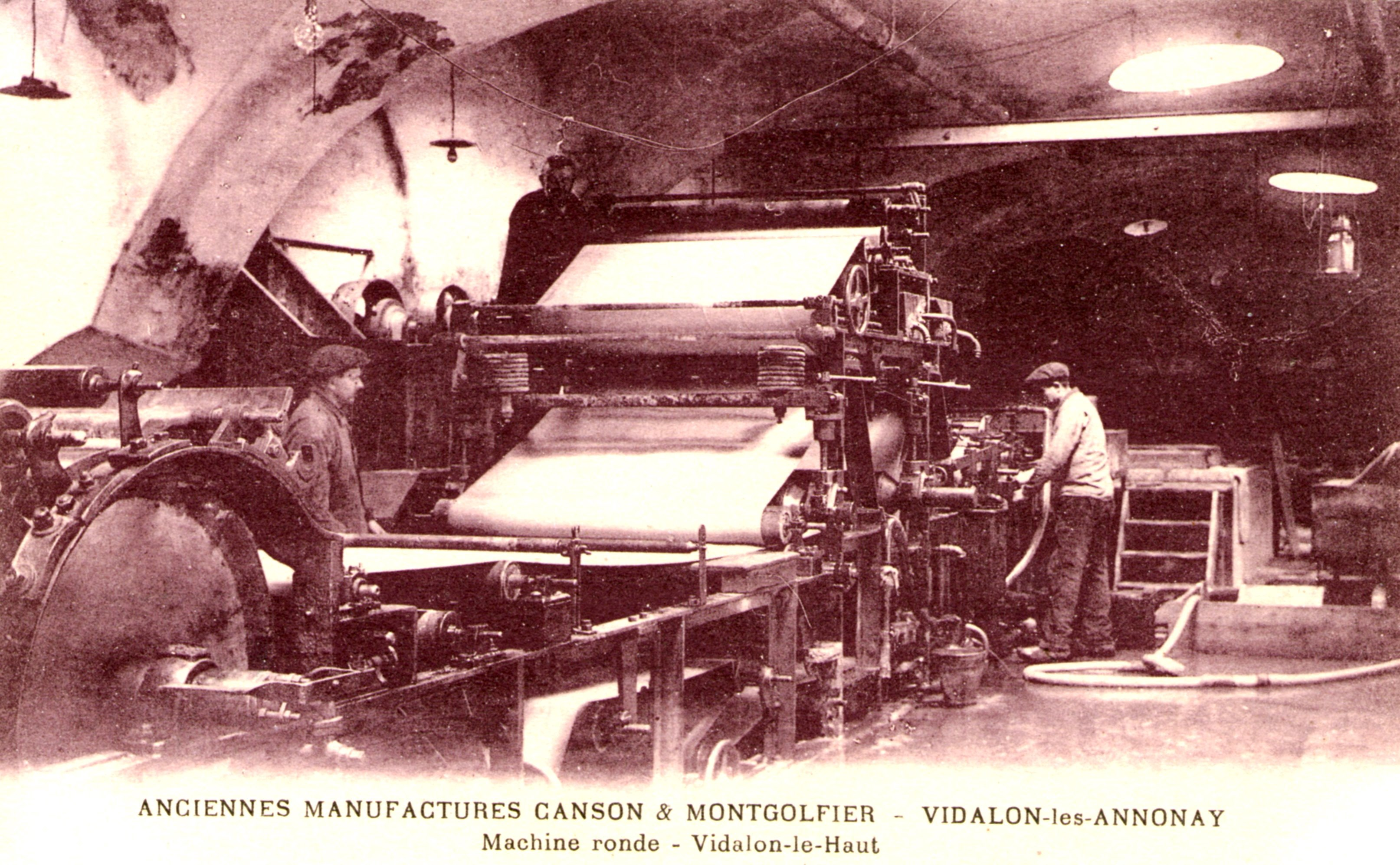 Davézieux Vidalon machine ronde